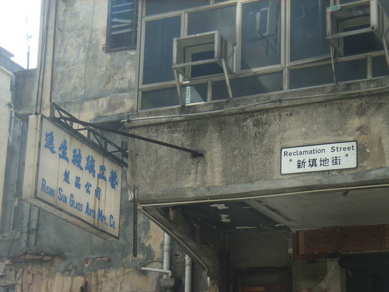 浴德池 (Yuk Tak Chee Sauna) 是香港第一間上海澡堂，位於旺角zh:太子道西123號地下及2樓 Photo by User:OLAMB.